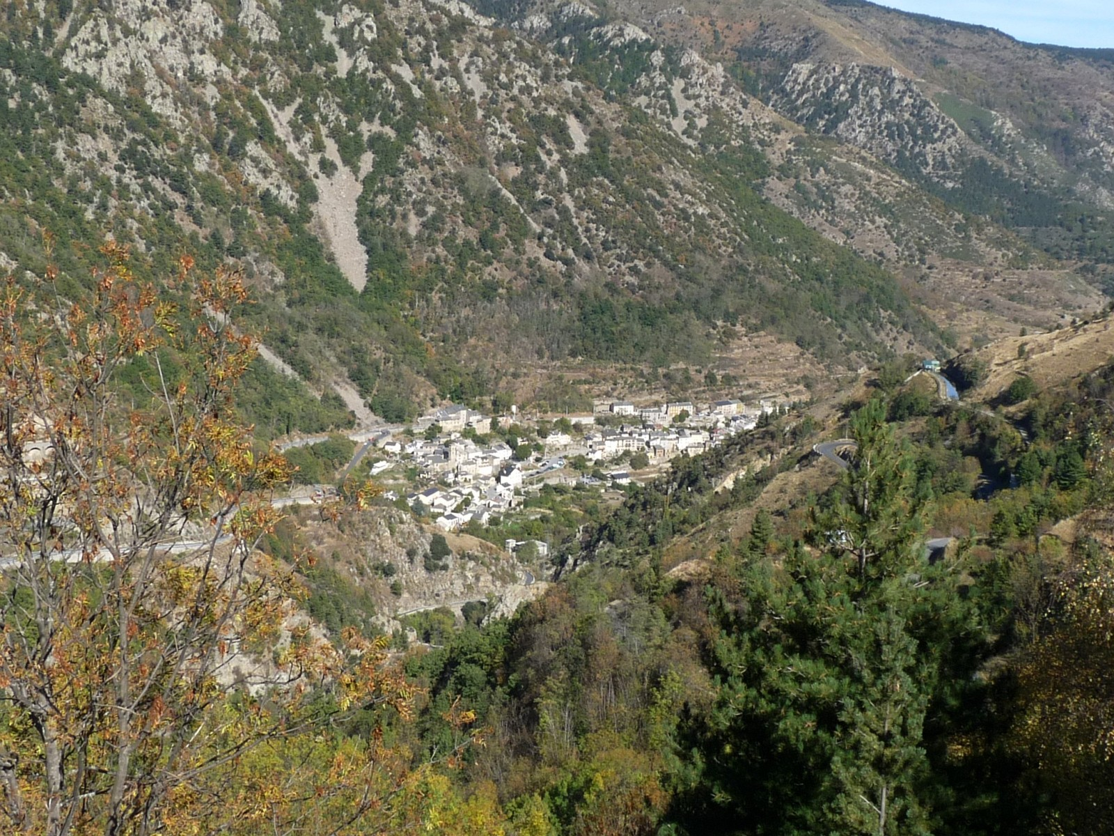 Fontpédrouse vue depuis Prats-Balaguer, Pyrénées-Orientales, France